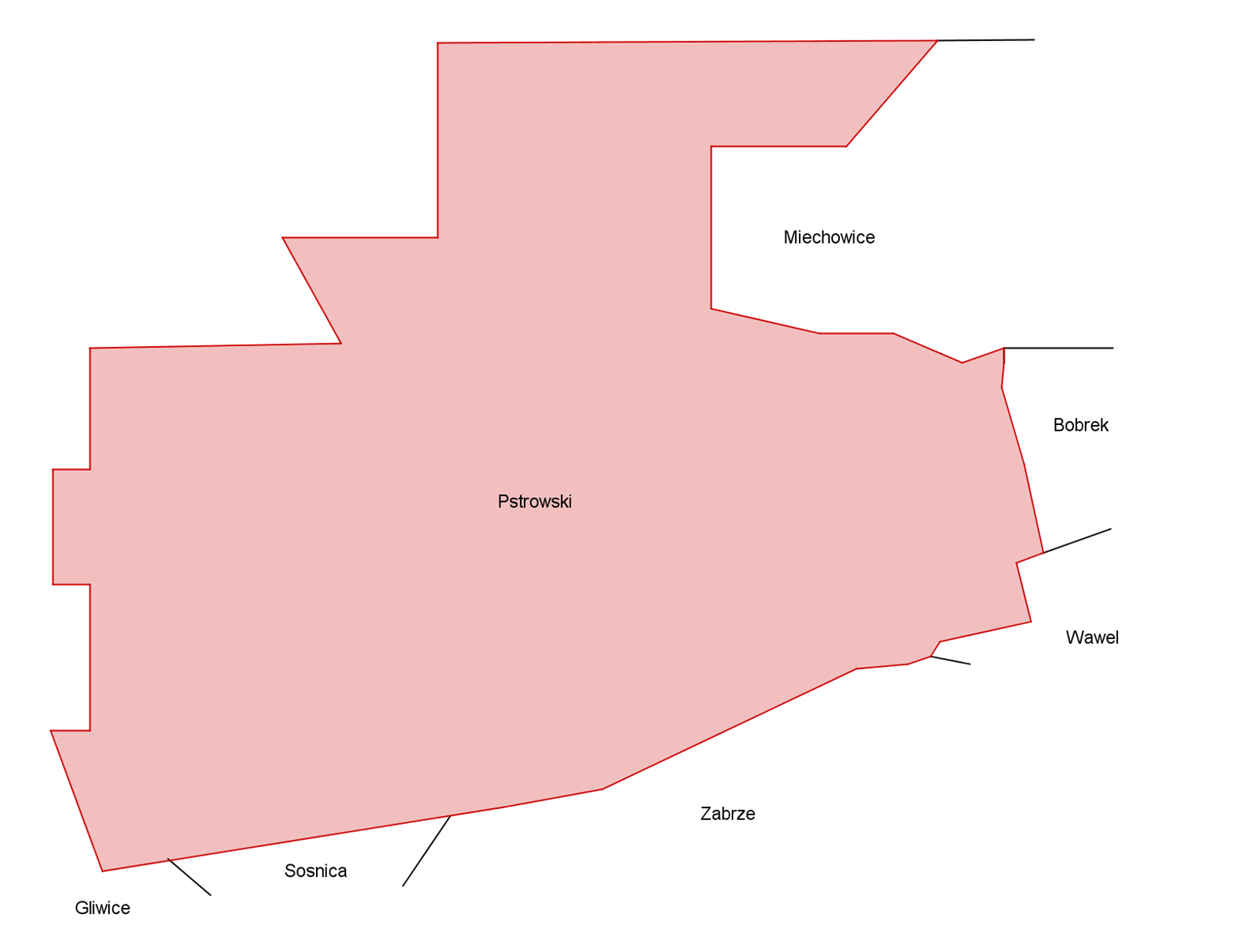 Berechtsame der Bergwerke im Norden von Zabrze Situation 1975